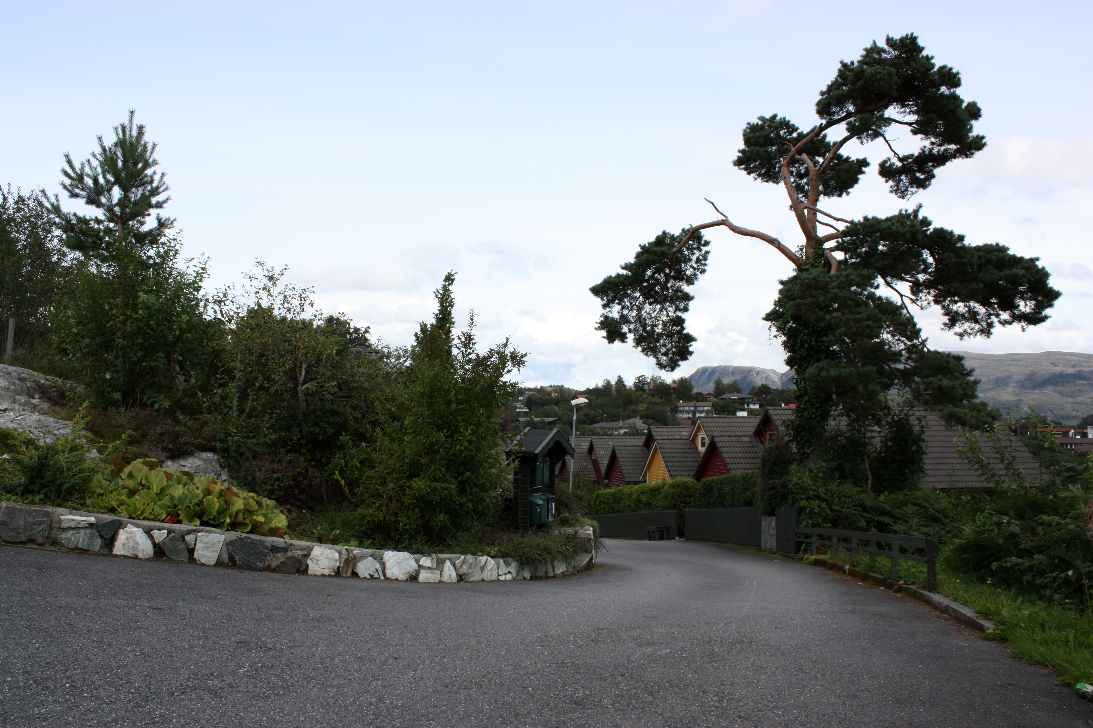 Tranevegen, Fana, Bergen. August 2009.